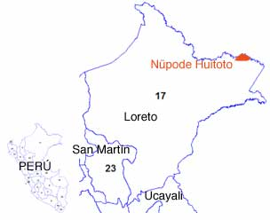 un mapa de la extensión de la lengua nüpode huitoto en el perú